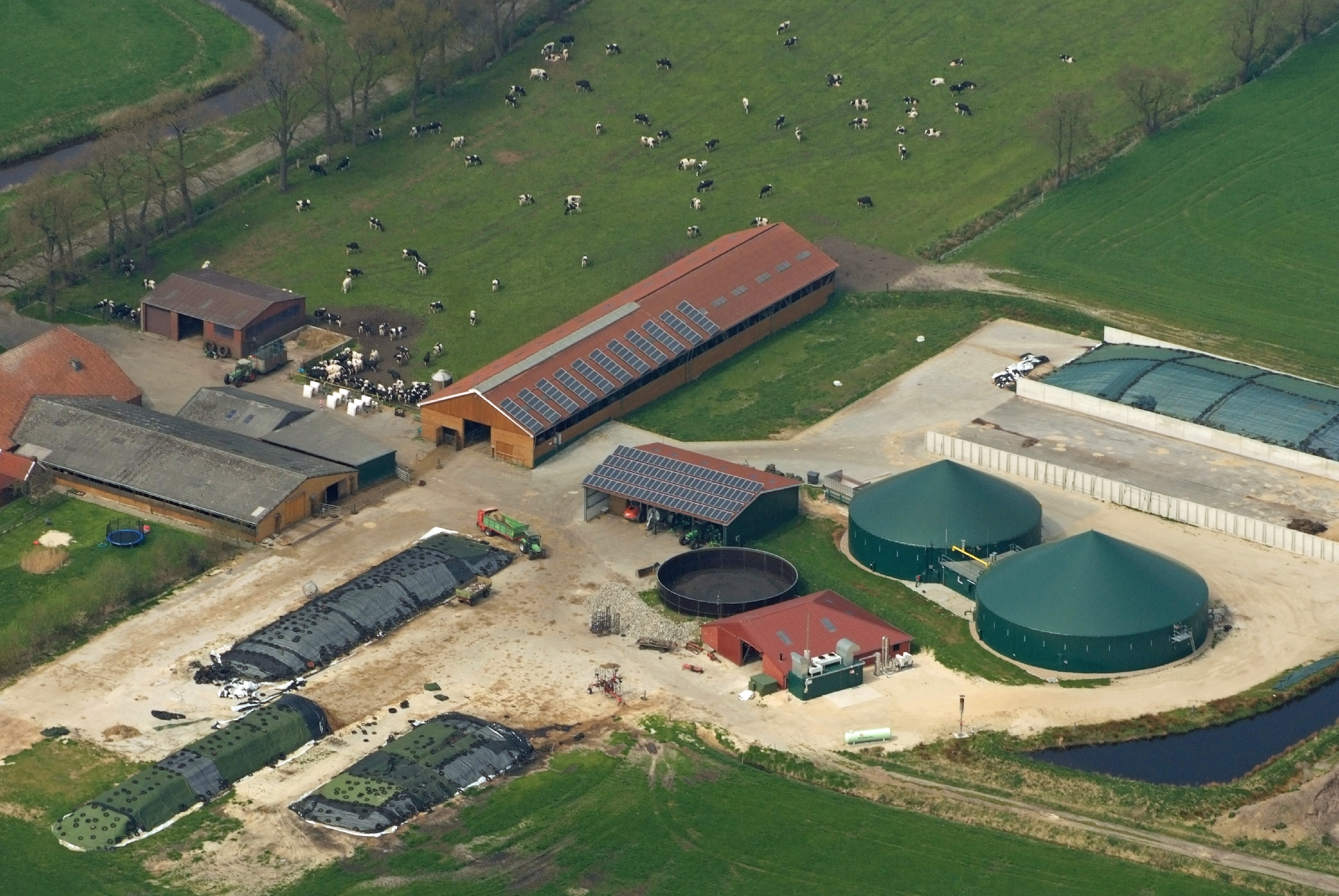 Fotoflug von Nordholz-Spieka nach Oldenburg und Papenburg